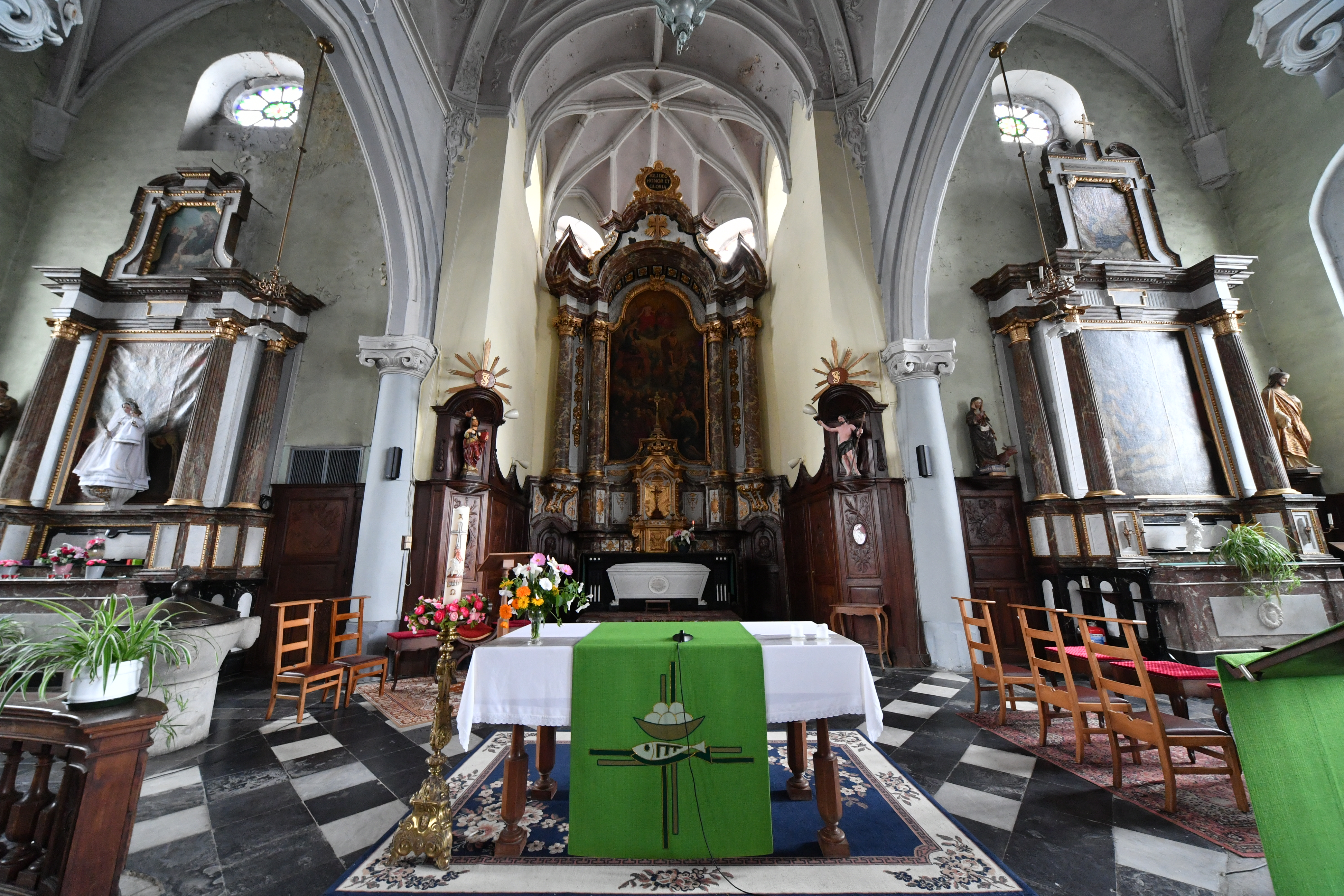 Clermont - Église Saint-Jacques-le-Majeur - Innenansicht